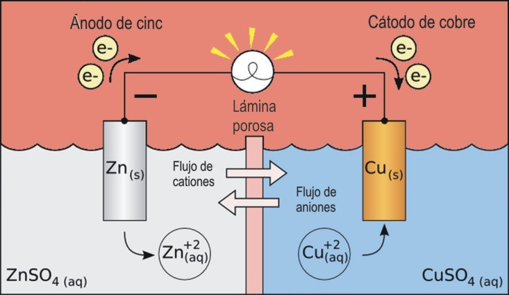 Traducción al castellano de es::Imagen:Galvanic cell.png, por tanto